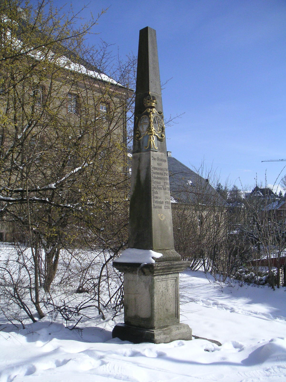 Distanzsäule in Grünhain vor dem Eingang zum ehemaligen Kloster